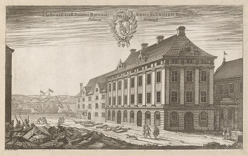 Titel i svensk övers. : Den lysande och utmärkte herr baronen och riksrådet Erik Flemings palats i Stockholm